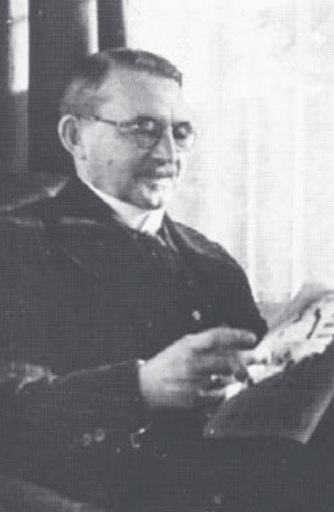 Klaas de Boer (1865-1943), onderwijzer, portret van rond 1910-1920. De Boer is bekend als de samensteller van de liedbundel "Kun je nog zingen, zing dan mee" (1906).